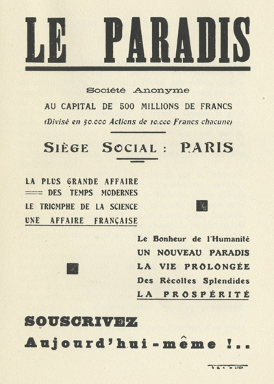 extrait du livre de R.-M. Gattefossé, "Paradis Société anonyme" (1941)